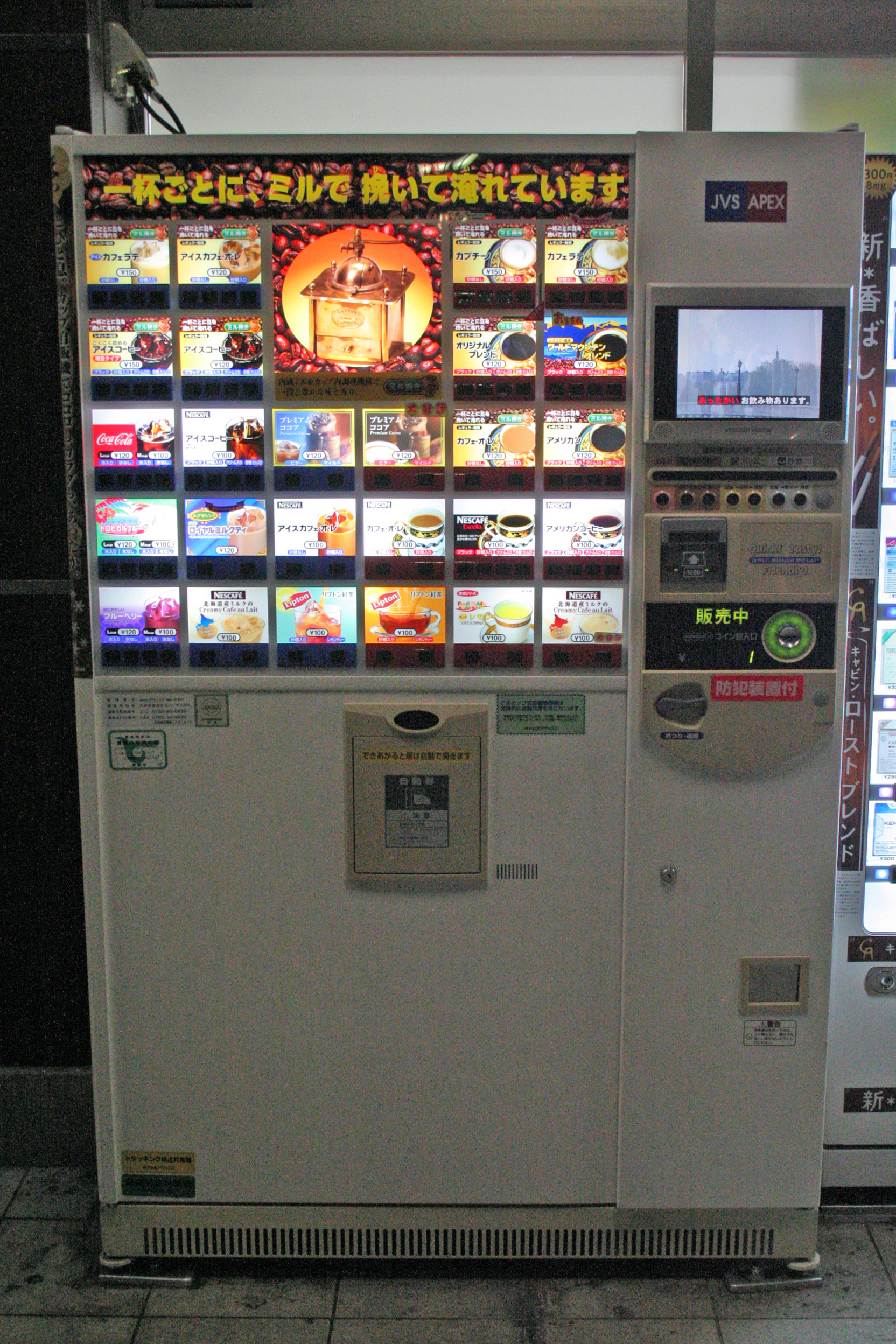 紙コップタイプのソフトドリンク自動販売機。夜間撮影。